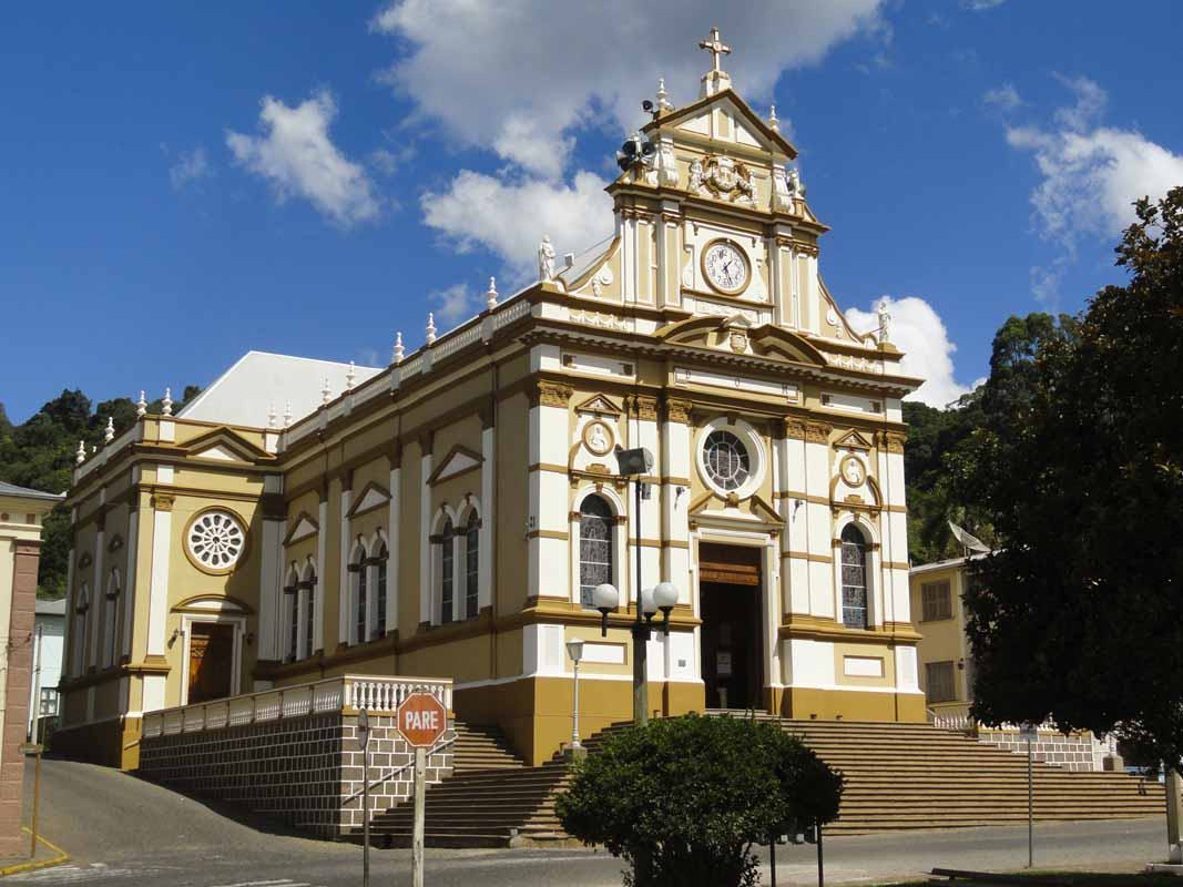 Centro Histórico de Antônio Prado - Igreja Matriz Sagrado Coração de Jesus, av. dos imigrantes, 189. Construída de 1891 a 1897; reformas em 1899 e outra entre 1925 e 1928.[1]